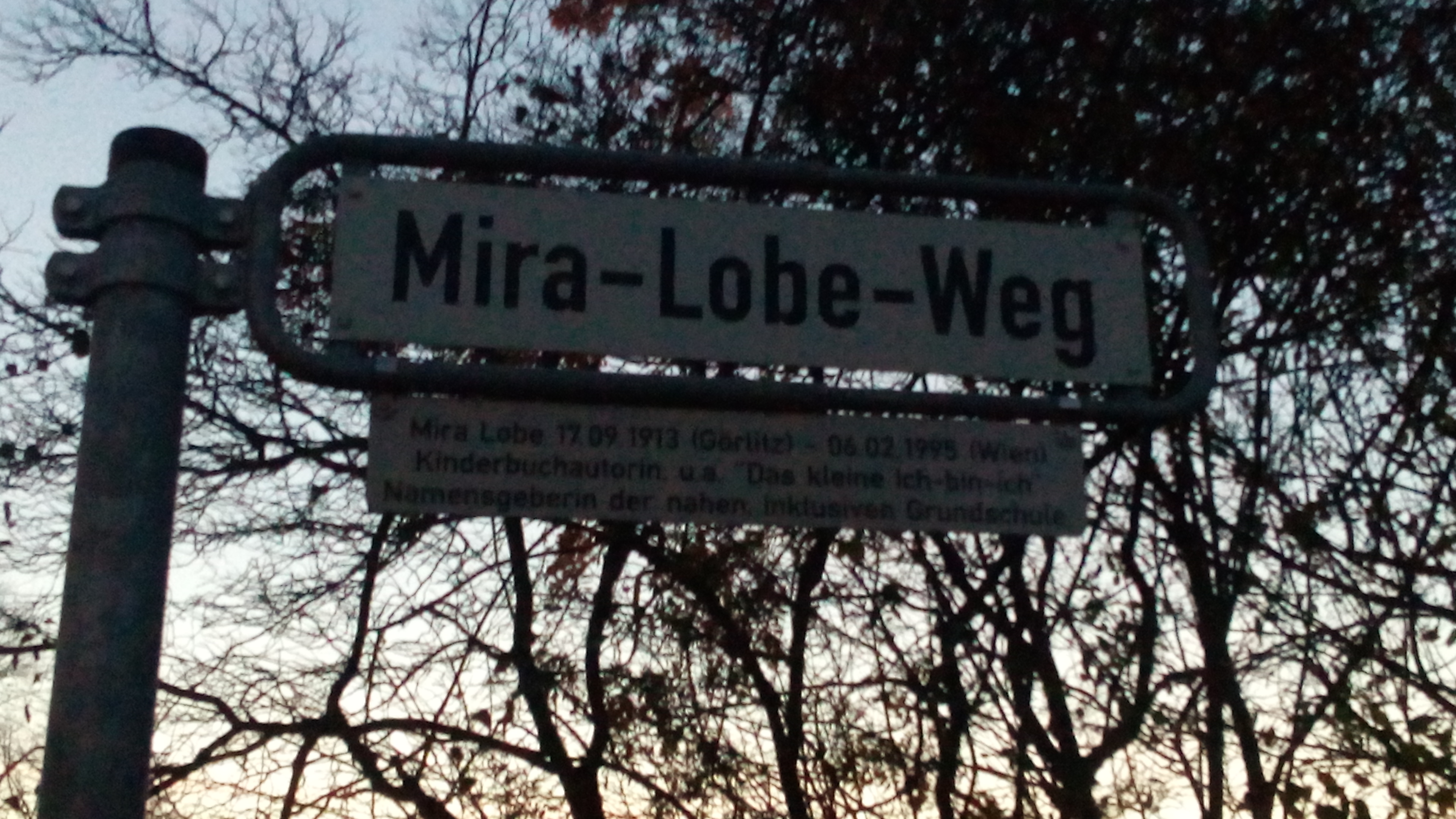 Straßenschild des Mira-Lobe-Wegs in Hannover mit folgender Aufschrift: Mira Lobe 17.09.1913 (Görlitz) - 06.02.1995 (Wien) Kinderbuchautorin, u.a. "Das kleine Ich-bin-ich" Namensgeberin der nahen, inklusiven Grundschule